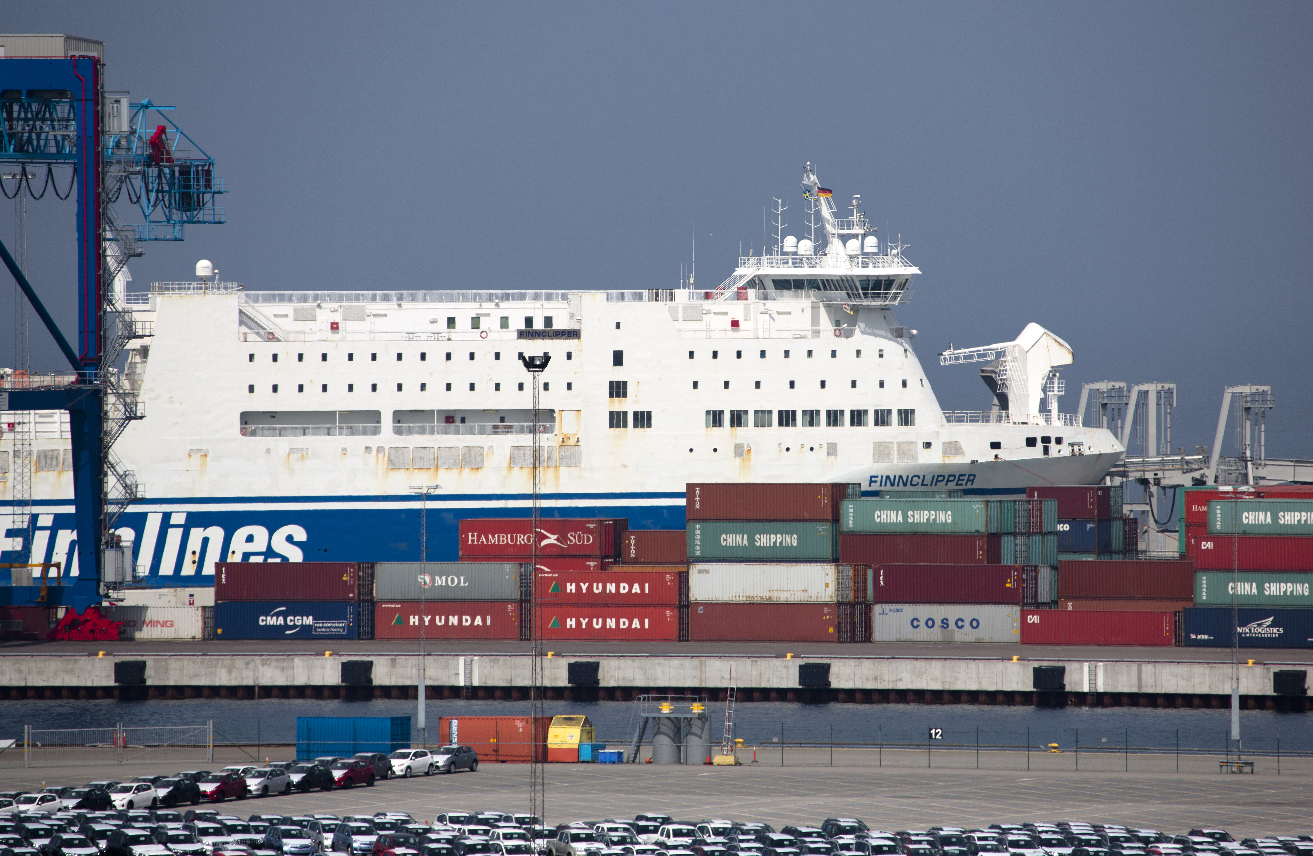 Malmös hamn fotograferad 11 maj 2013. Hamnen drivs av Malmö och Københavns gemensamma hamnbolag Copenhagen Malmö Port, CMP. Photo: News Øresund - Johan Wessman © News Øresund Bilden får fritt publiceras under förutsättning att källa anges (Foto: News Øresund - Johan Wessman). The picture can be used freely under the prerequisite that the source is given (Photo: News Øresund - Johan Wessman). News Øresund, Malmö, Sweden. News Øresund är en oberoende regional nyhetsbyrå som ingår i projektet Øresund Media Platform som drivs av Øresundsinstituttet i partnerskap med Lunds universitet och Roskilde Universitet och med delfinansiering från EU (Interreg IV A Öresund) och 14 regionala; icke kommersiella aktörer.